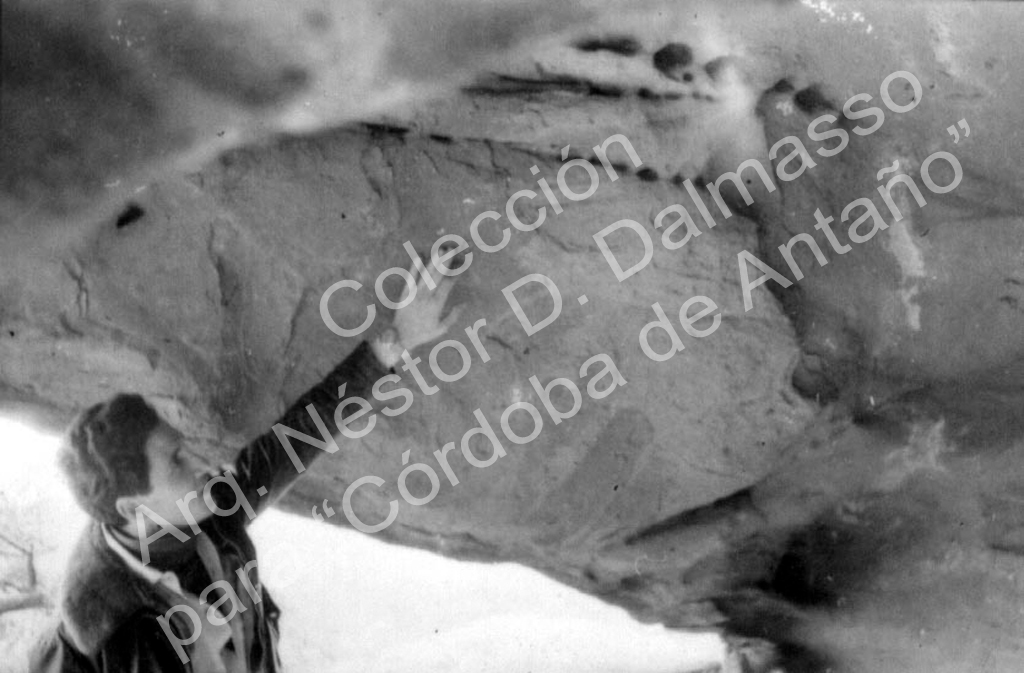 Livio Incatasciato 06 Pictografias Cerro Colorado1969-P